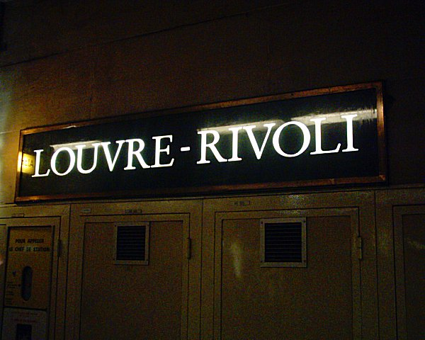 Plaque de la station du Louvre du Métropolitain de Paris.